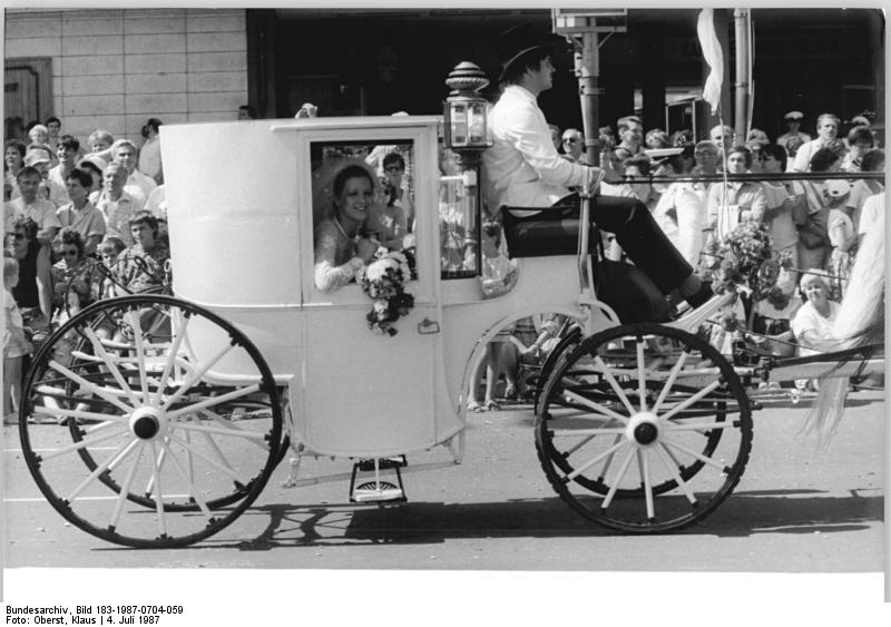 ADN-ZB Oberst 4.7.87 Berlin: Jubiläum-Festumzug. Zehn Berliner Brautpaare, die am 4. Juli den "Bund fürs Leben" geschlossen hatten, reihten sich in weißen Hochzeitskutschen in den Festumzug ein.